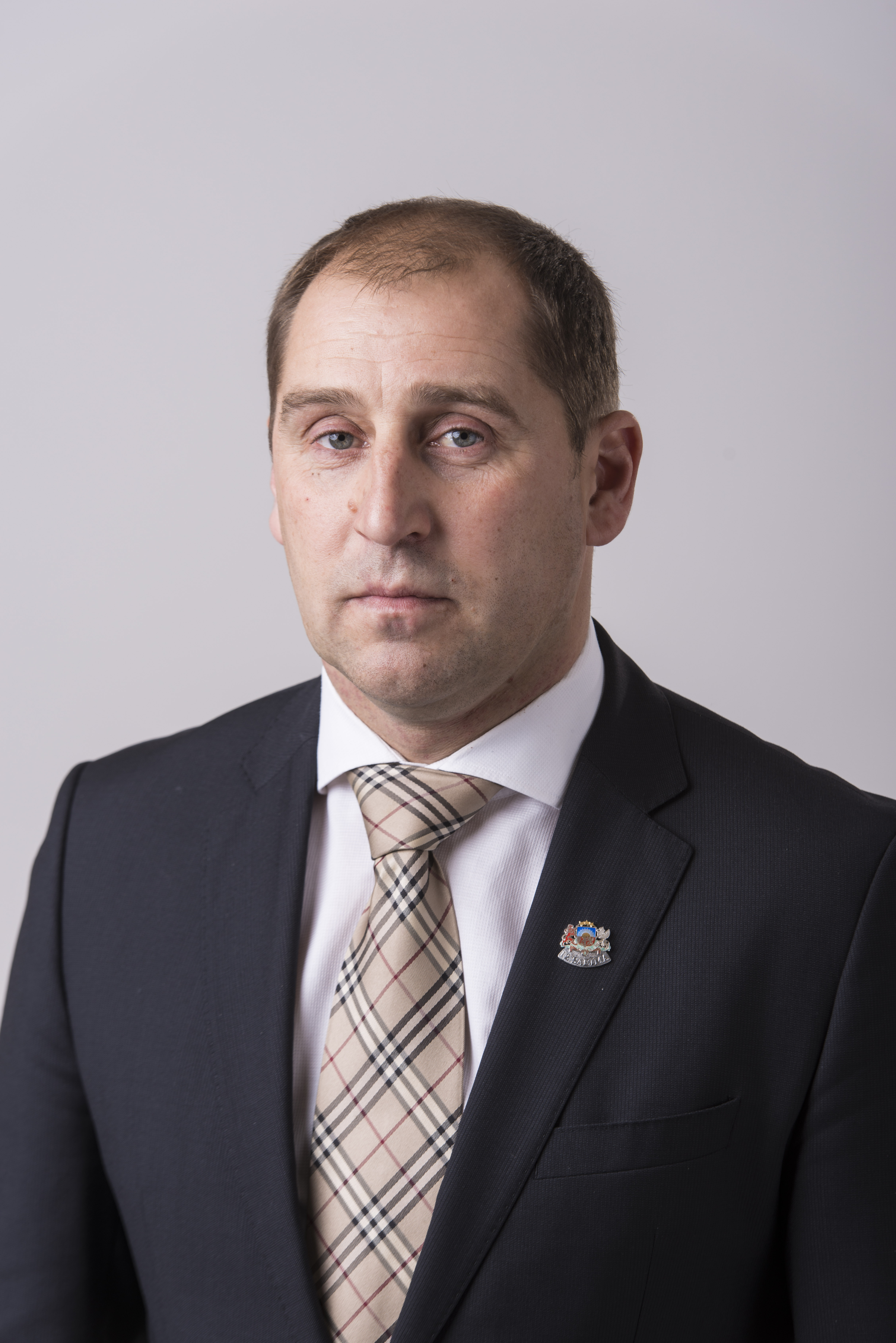 2014.gada 9.decembris. 12.Saeimas deputāts Artis Rasmanis. Foto: Reinis Inkēns, Saeimas Kanceleja Izmantošanas noteikumi: saeima.lv/lv/autortiesibas